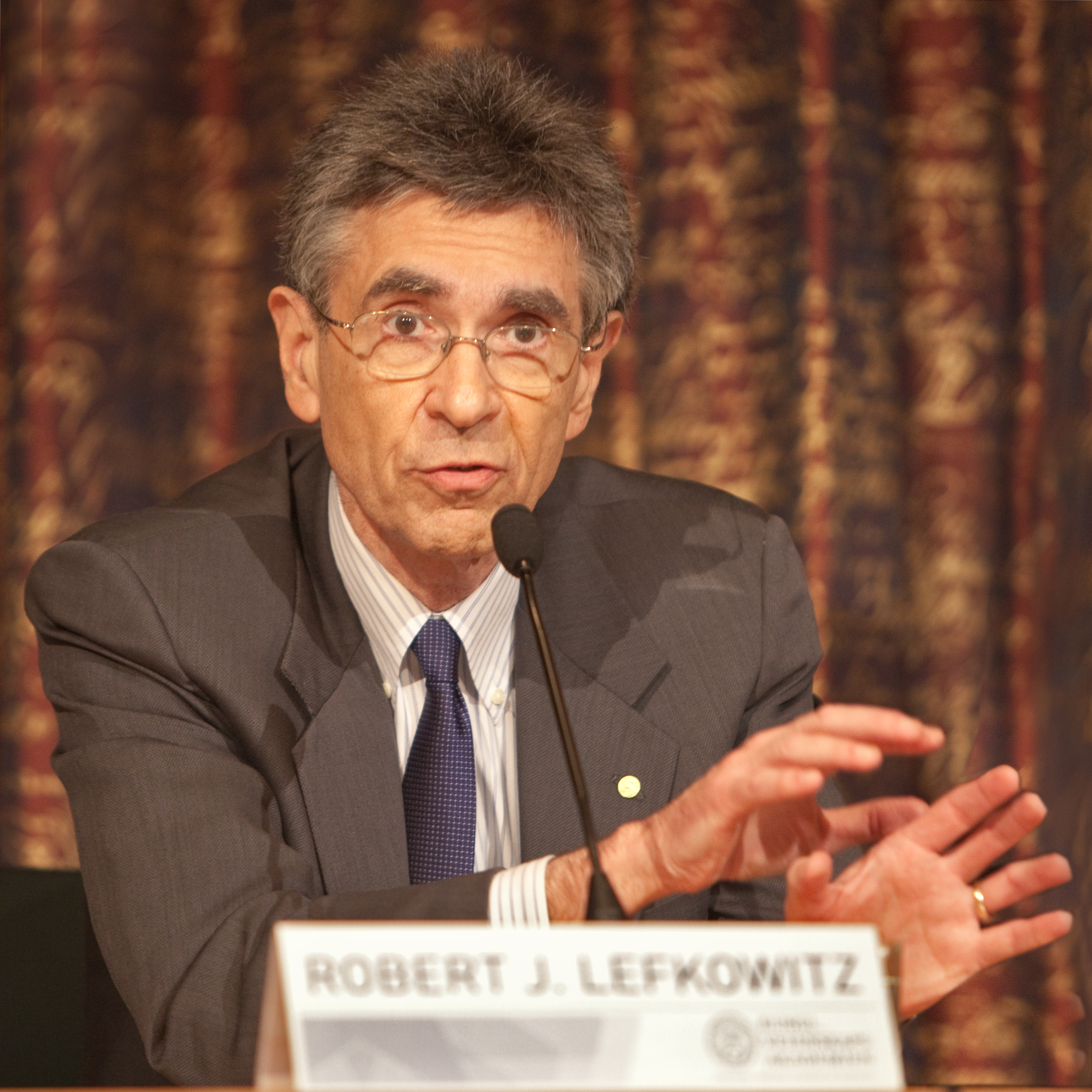 Robert Lefkowitz, Nobel Prize winner in chemistry 2012